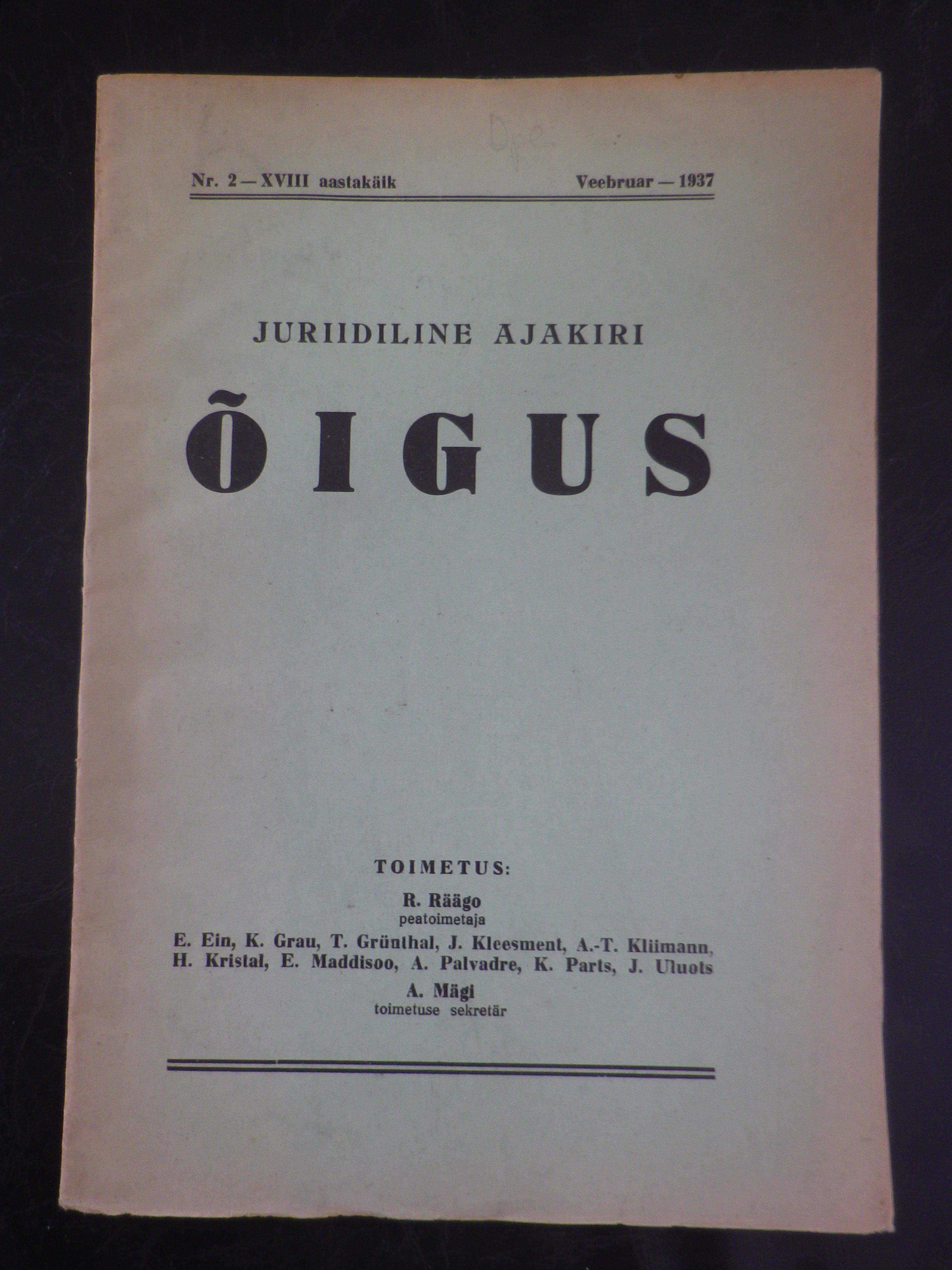 Juriidilise ajakirja "Õigus" 1937. aasta 2. numbri esikaas, peatoimetajaks tollal Richard Räägo.